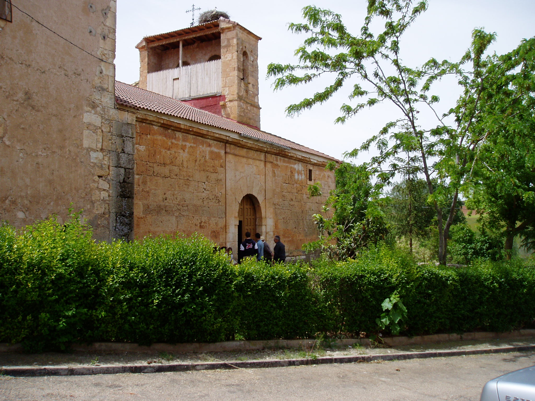 Fuentenebro iglesia